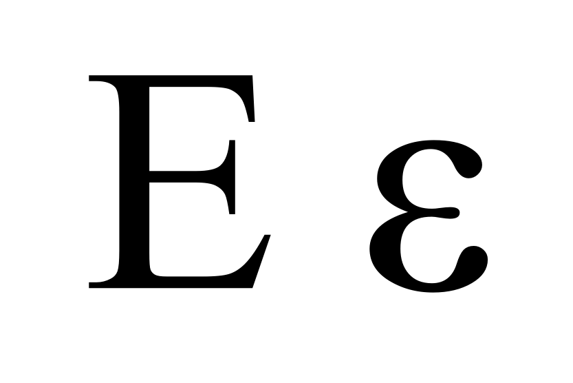 greek letter epsilon